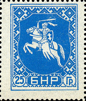 Беларуская (тарашкевіца): Марка Беларускай Народнай Рэспублікі (25 грошаў)